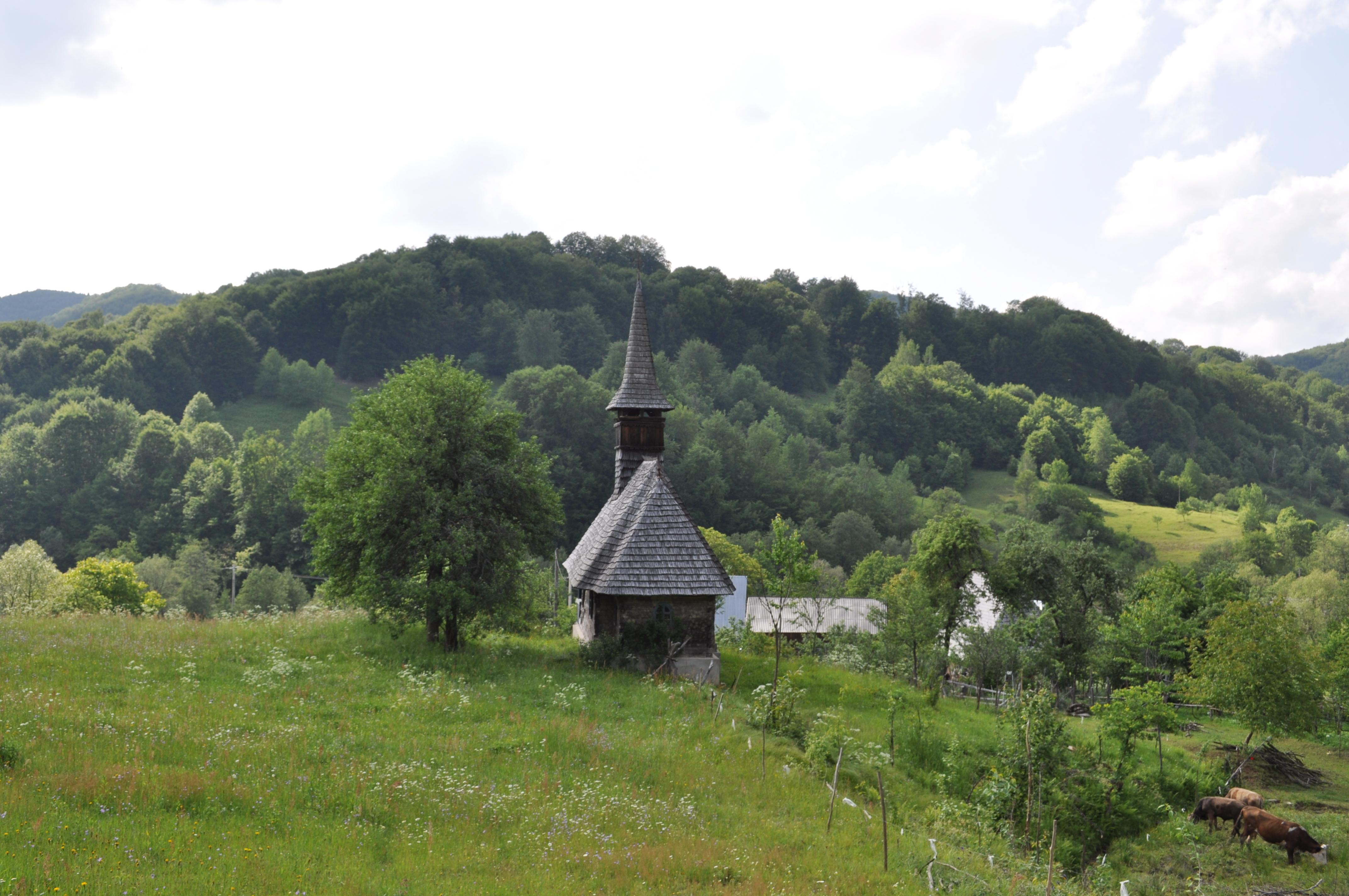 Biserica de lemn "Sf. Ioan Evanghelistul" , sat IZVOARELE; comuna CERNEŞTI